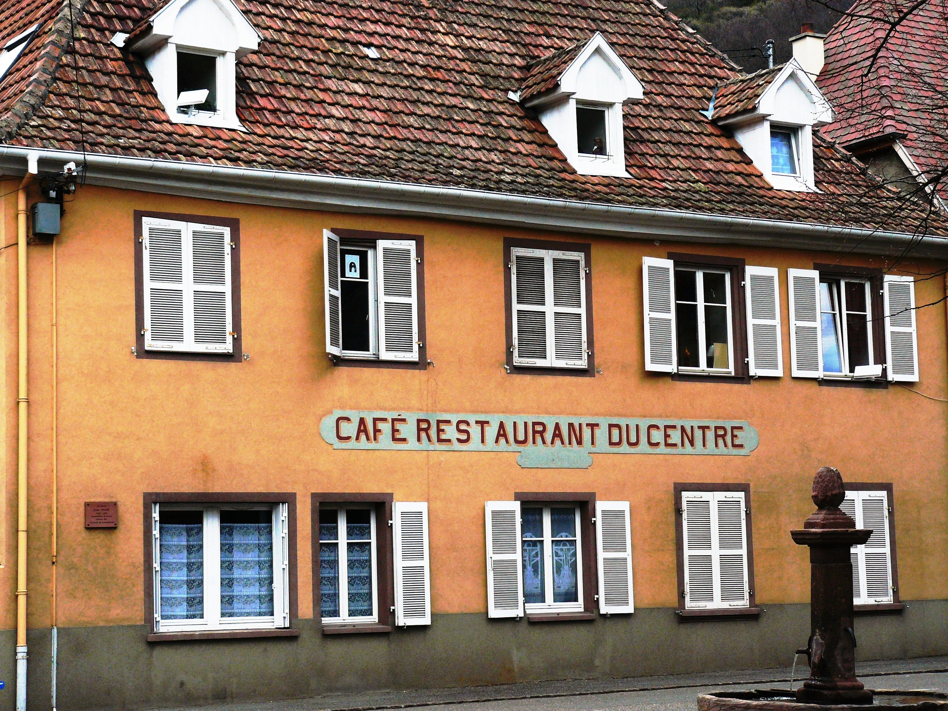 Maison natale de Jean Egen (1920-1995) journaliste-écrivain, auteur des Tilleuls de Lautenbach